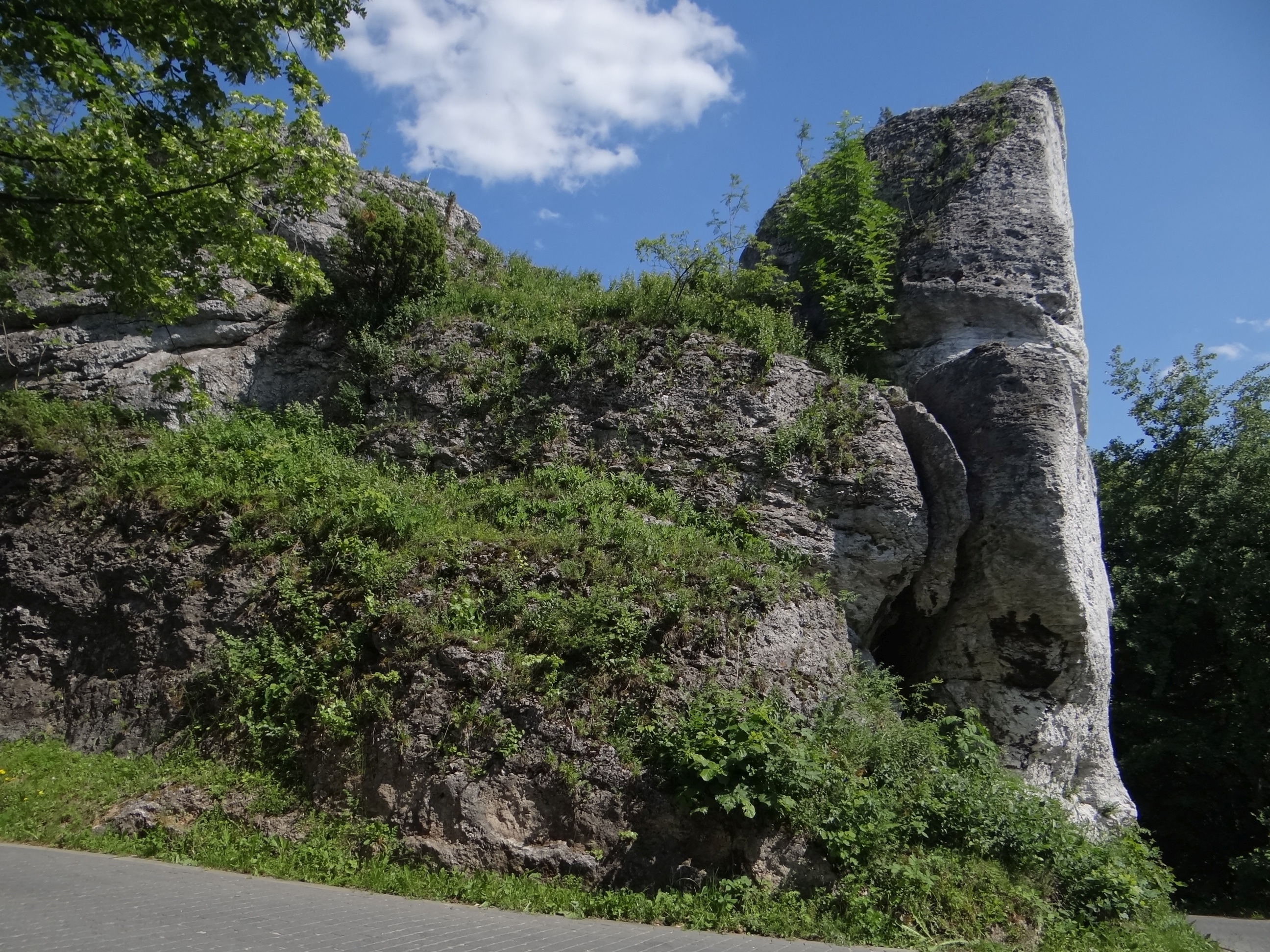 Skała Kapelusz w Podzamczu